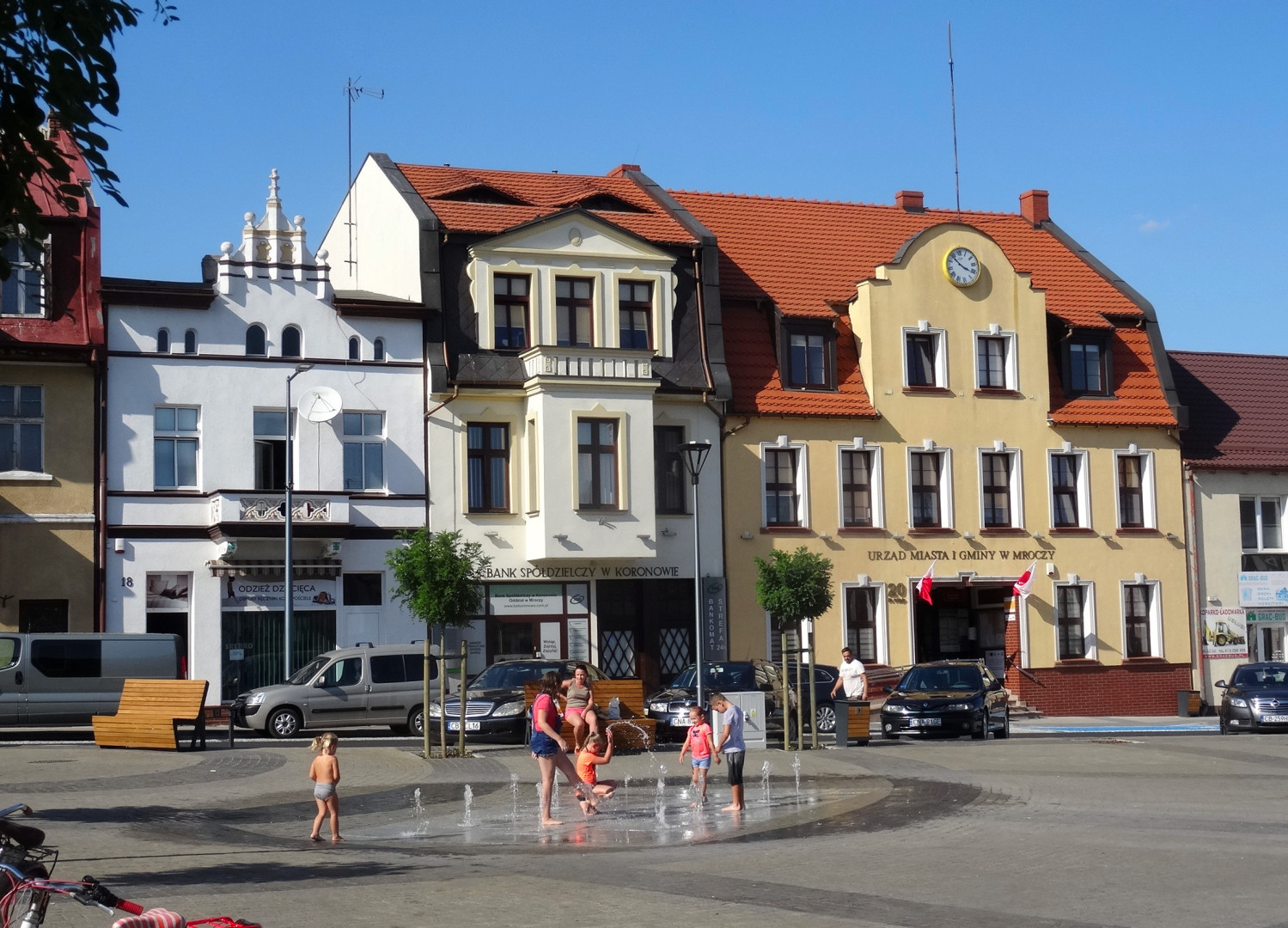 Rynek miejski w Mroczy